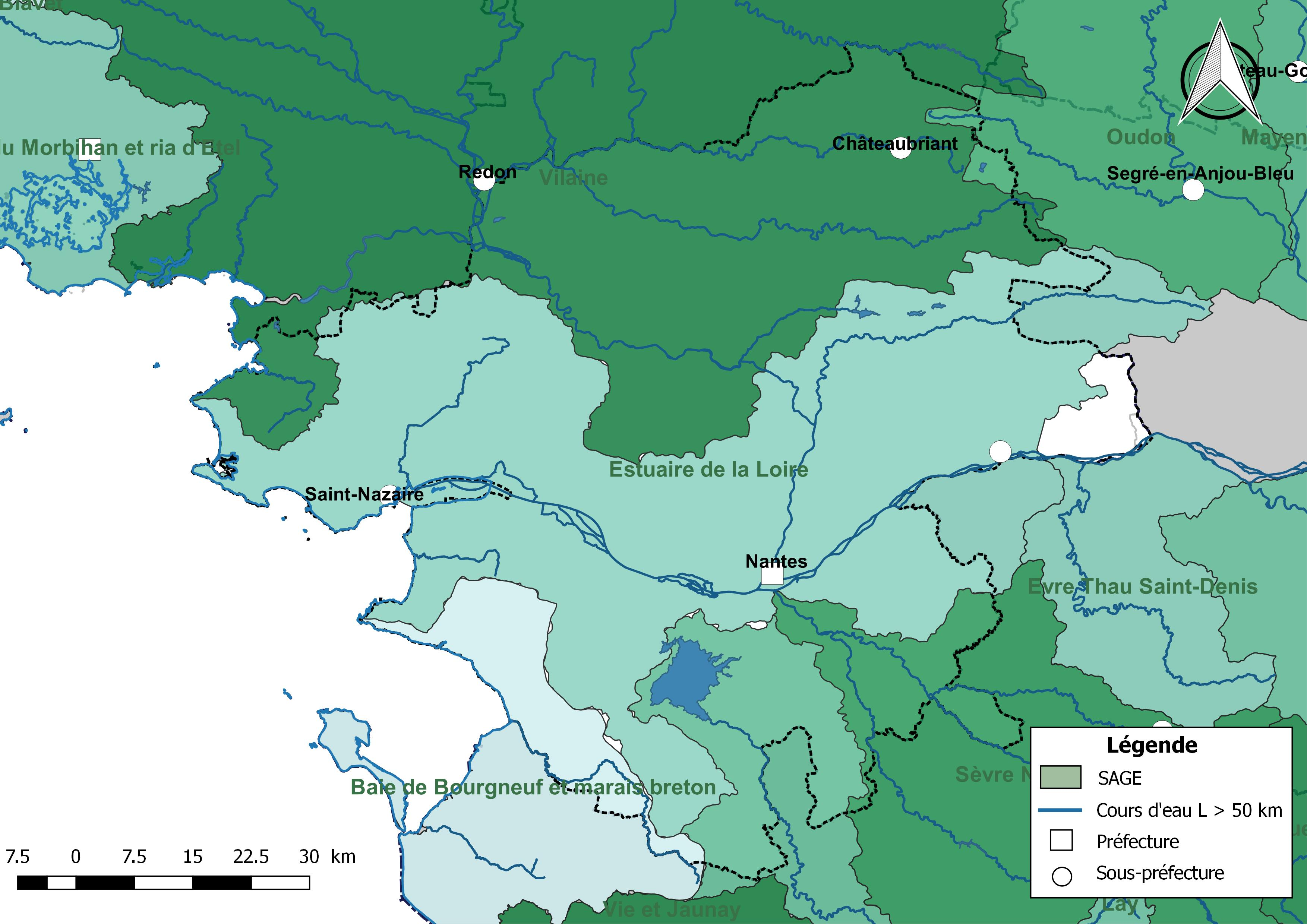 Carte des schémas d'aménagement et de gestion des eaux (SAGE) concernant le département de la Loire-Atlantique (France) au 1er janvier 2018.